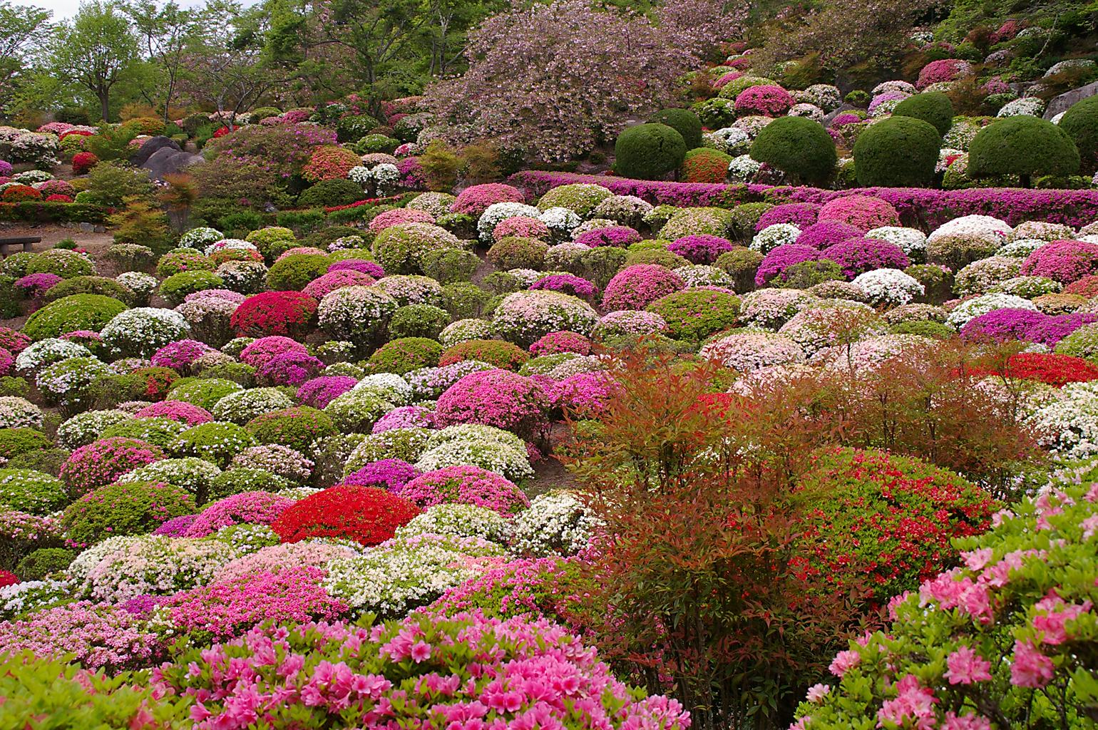 佐賀県武雄市にある御船山楽園